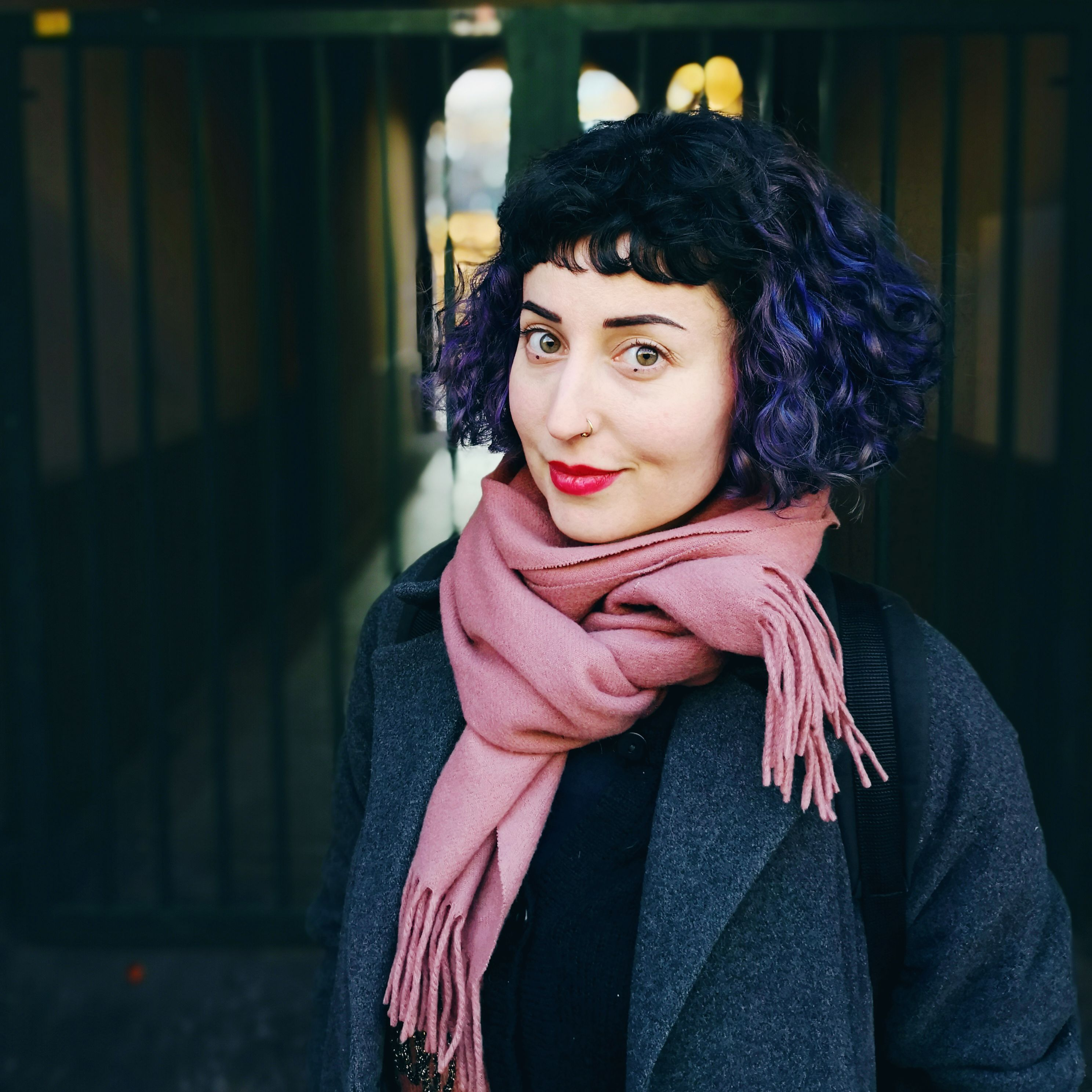 Fotografie der Autorin aus ihrem Social Media Auftritt.